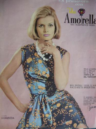 Chunchuna Villafañe modelando para Telas Amorella, circa 1964